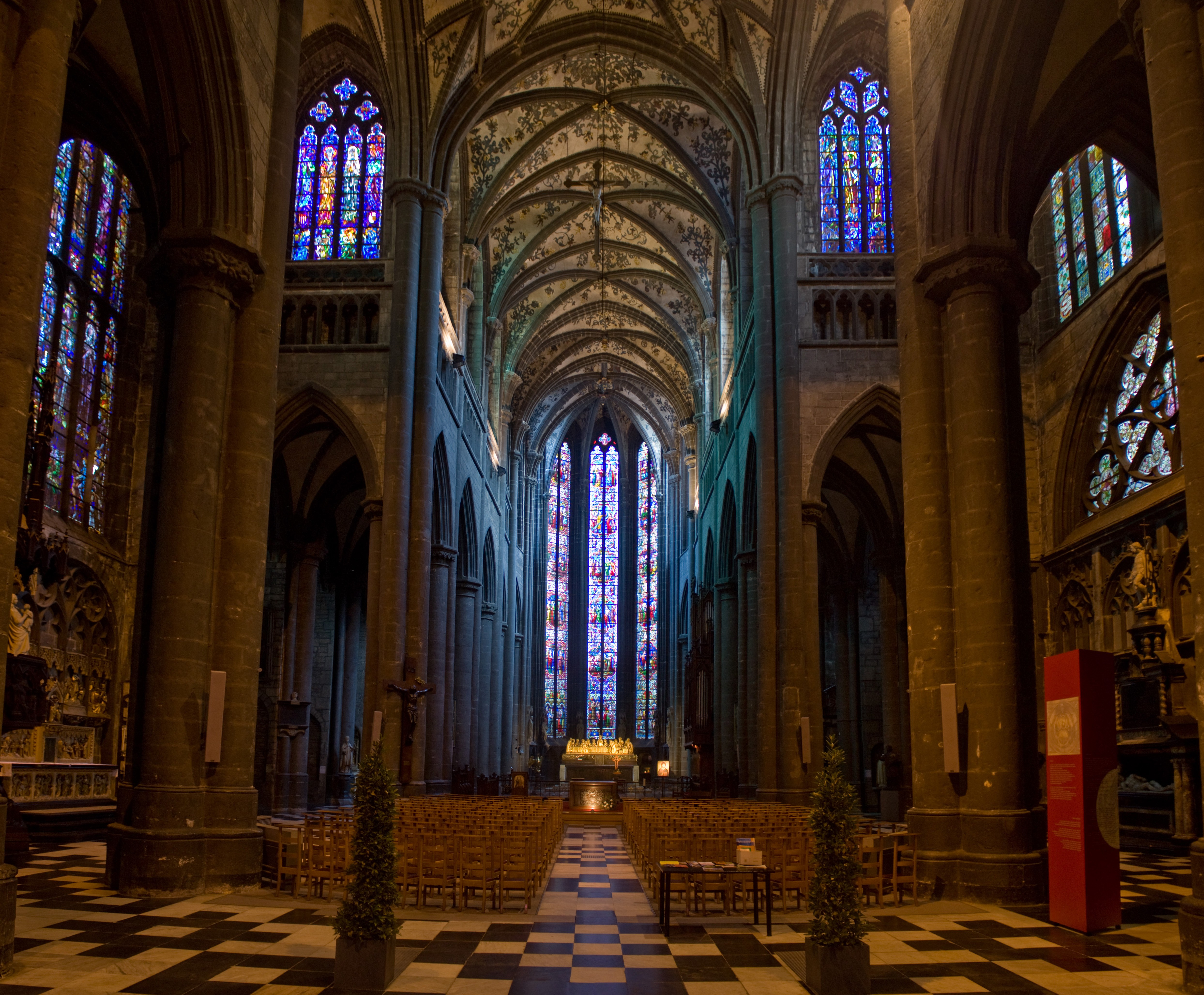 Collegiale kerk Notre-Dame